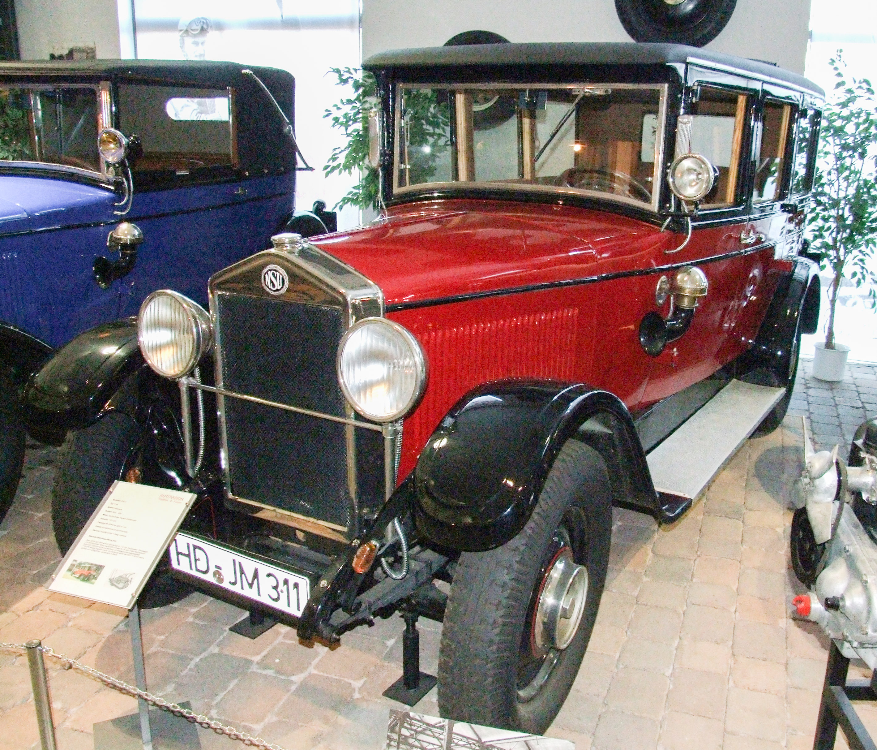 NSU Typ 7/34, 1928-1930, 1781 ccm, 34 PS (CV / HP) bei 3200 Umdrehungen, Kardanantrieb auf die Hinterräder, Angeflanschtes Dreiganggetriebe, Museum Autovision, Altlußheim, Deutschland